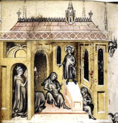 Tombeau de Saint-Louis d'après les Heures de Jeanne d'Evreux